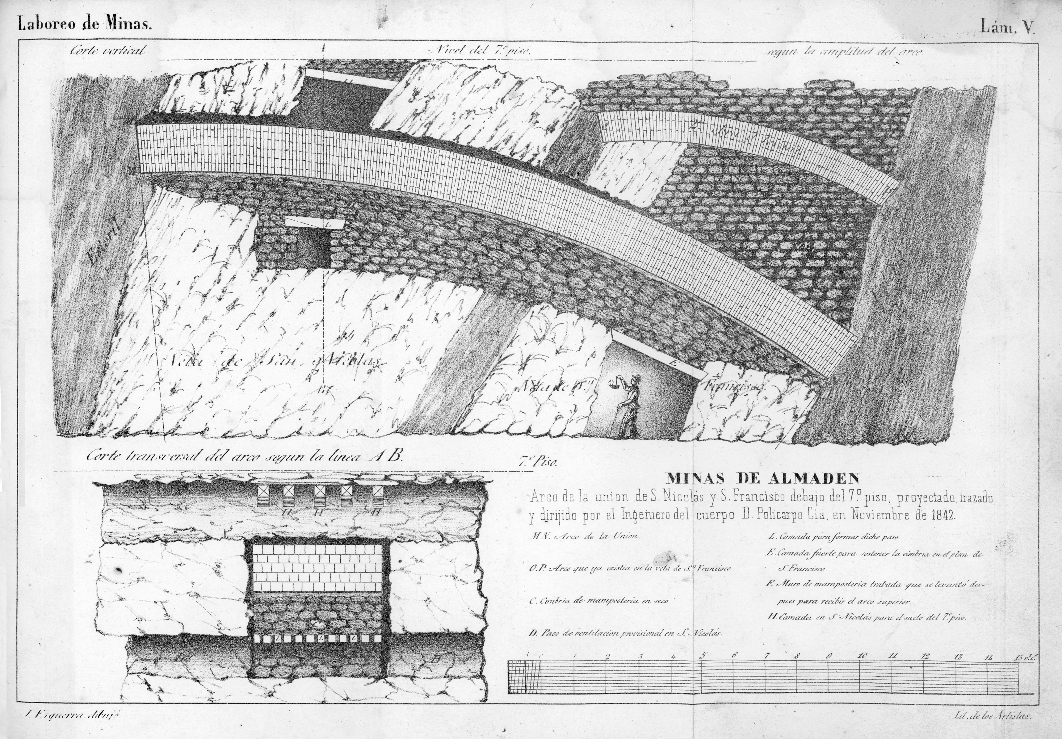 Ezquerra del Bayo. Obras en Almadén.